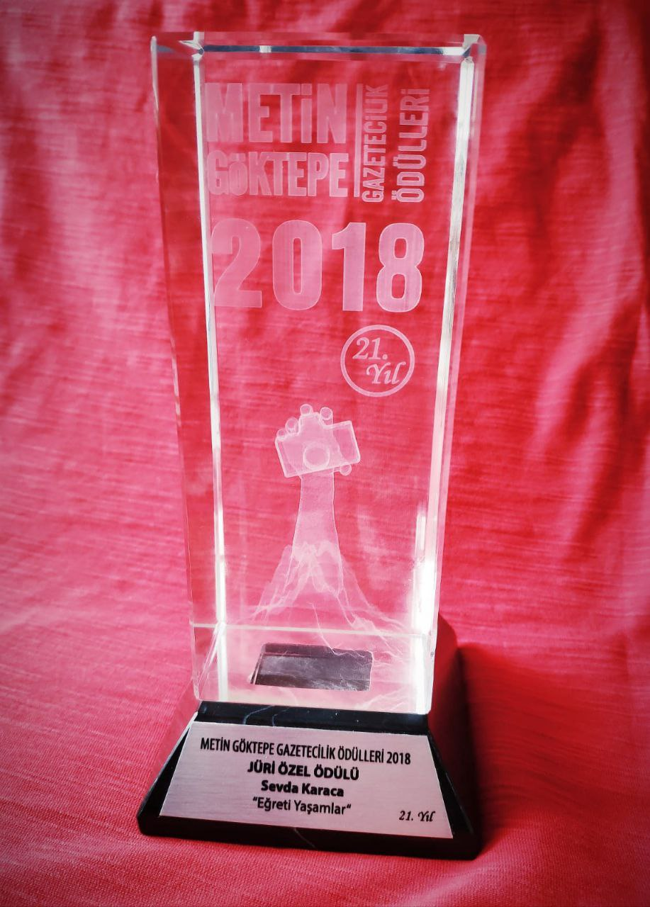 2018 yılında kadınların yaşamlarda karşılaştıkları zorlukları ele alan "Eğreti Yaşamlar" başlıklı Evrensel gazetesinde yayımlanan haber dosyasıyla Metin Göktepe Gazetecilik Ödülünü kazanan Sevda Karaca'nın ödülü.